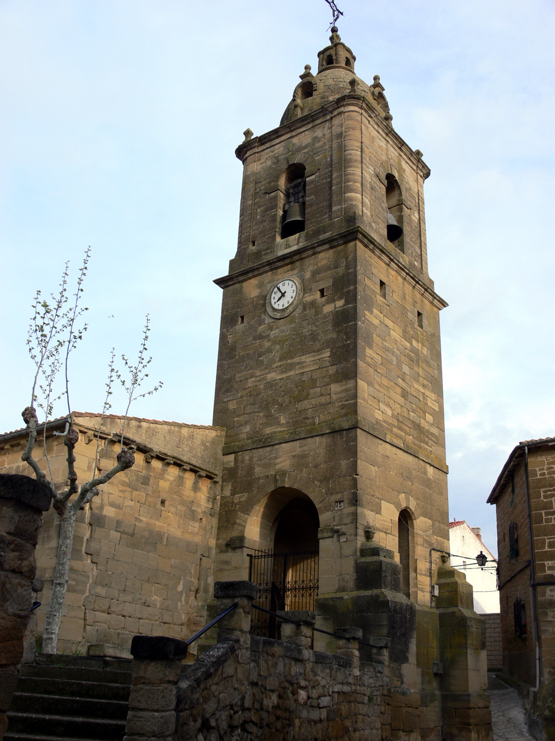 Iglesia de San Martín en Fonzaleche, La Rioja (España).